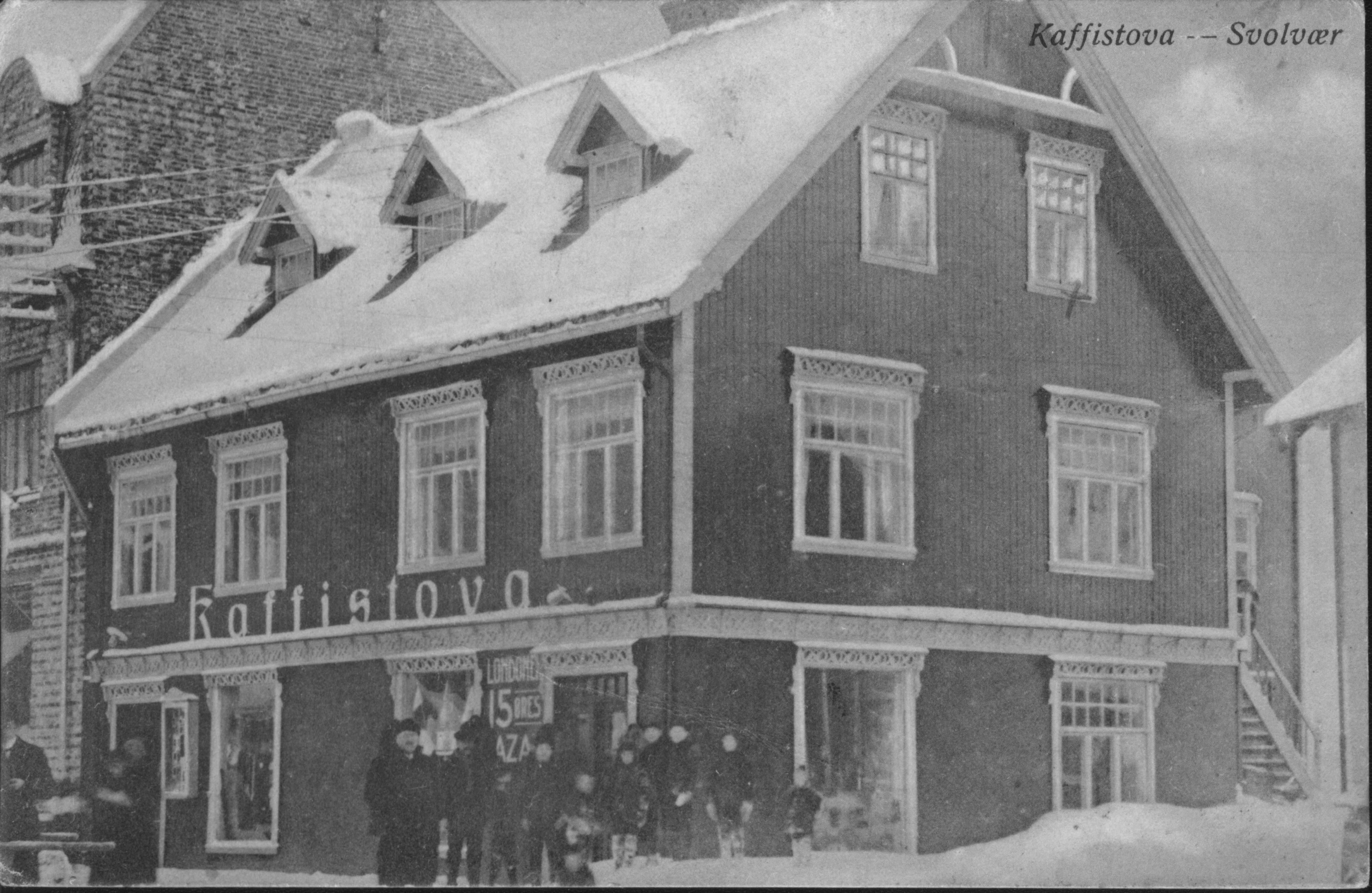 Kaffistova i Svolvær. Bildet er sendt som postkort fra Aslaug (Sørum?) til Mathilde Vudduaunet i Åsen 3. juni 1919. Aslaug bodde i det rommet som er merket med kryss. Fotograf / Photographer: Ukjent Fotoeier / Photo owner: Arne Sigmund Vudduaune Digitalisering / Digitizing: Arne Langås Foto-ID / Photo ID: 060-0113